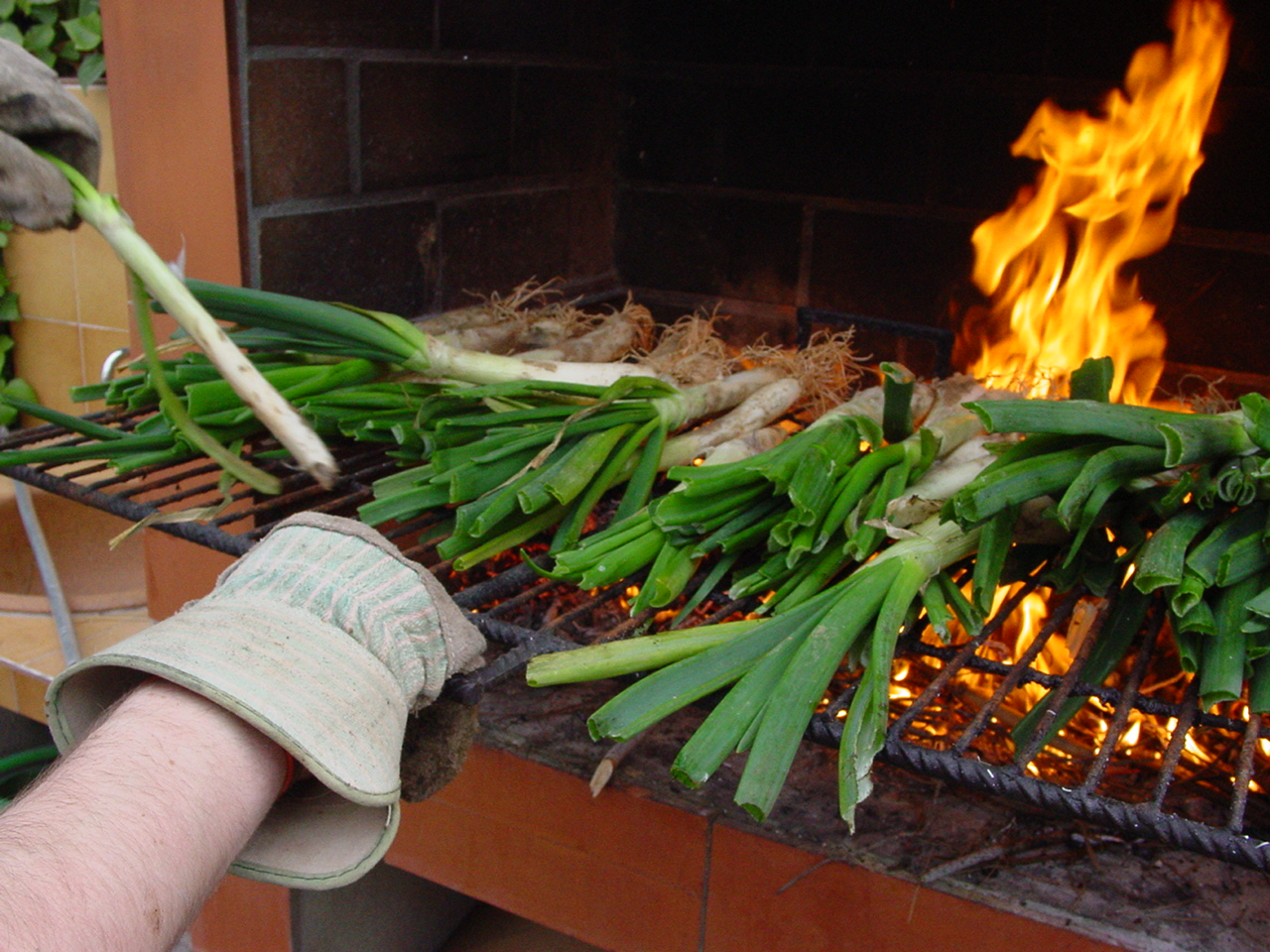 Calçotada familiar el 2007